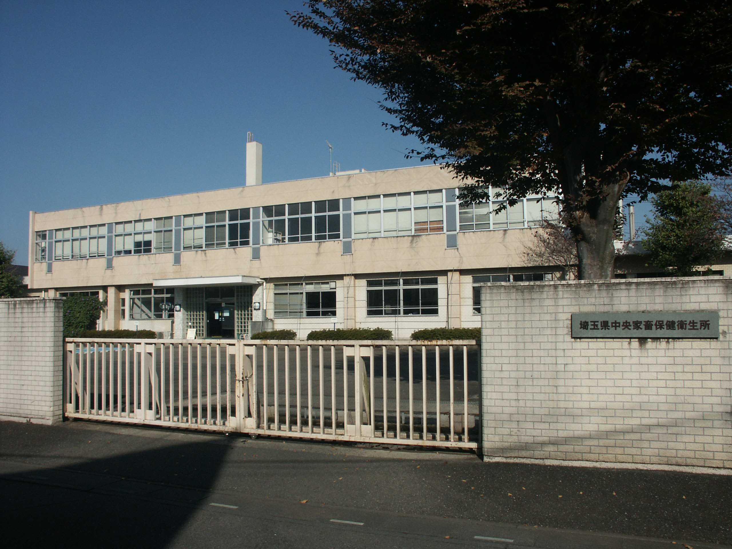 埼玉県中央家畜保健衛生所（正門付近）